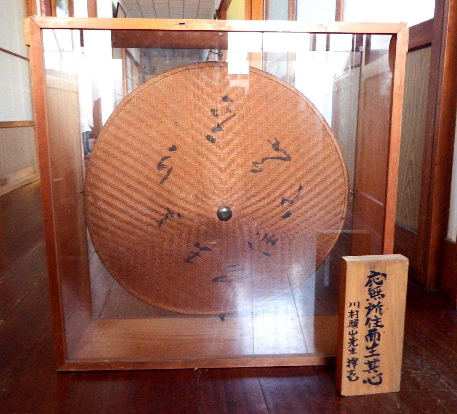 南光坊にある菅笠